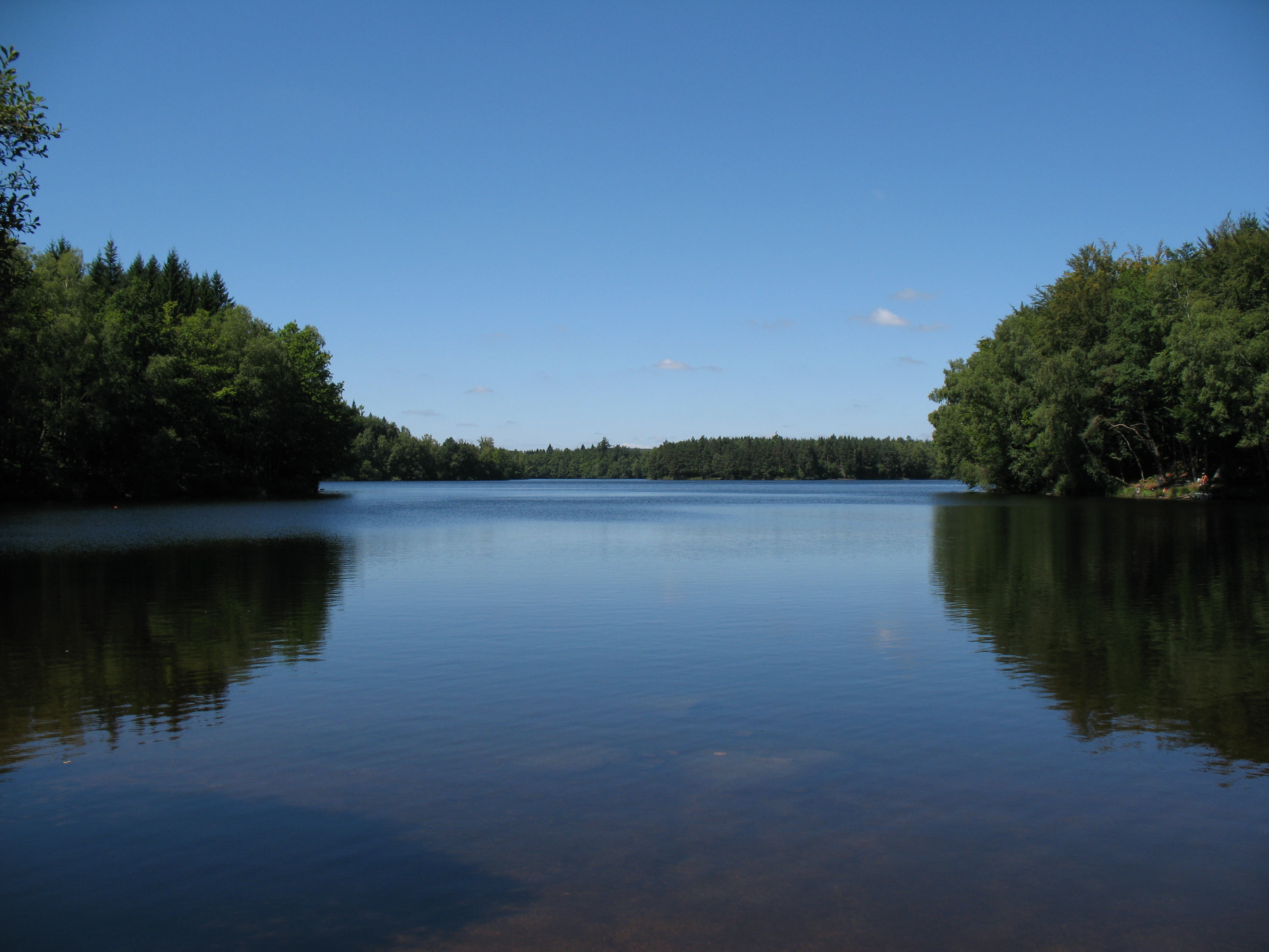 Lac de Faux, Faux-la-Montagne, Creuse, France